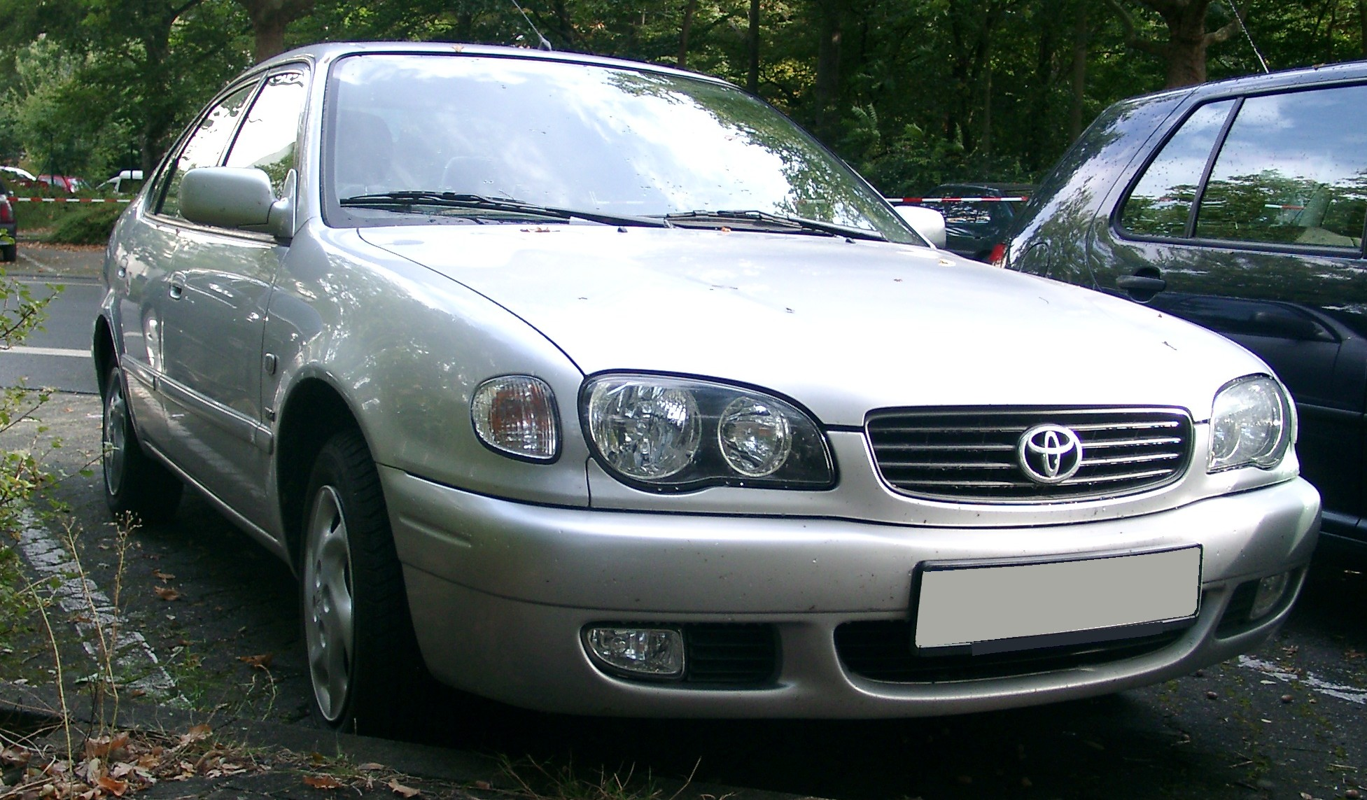 Toyota Corolla E11